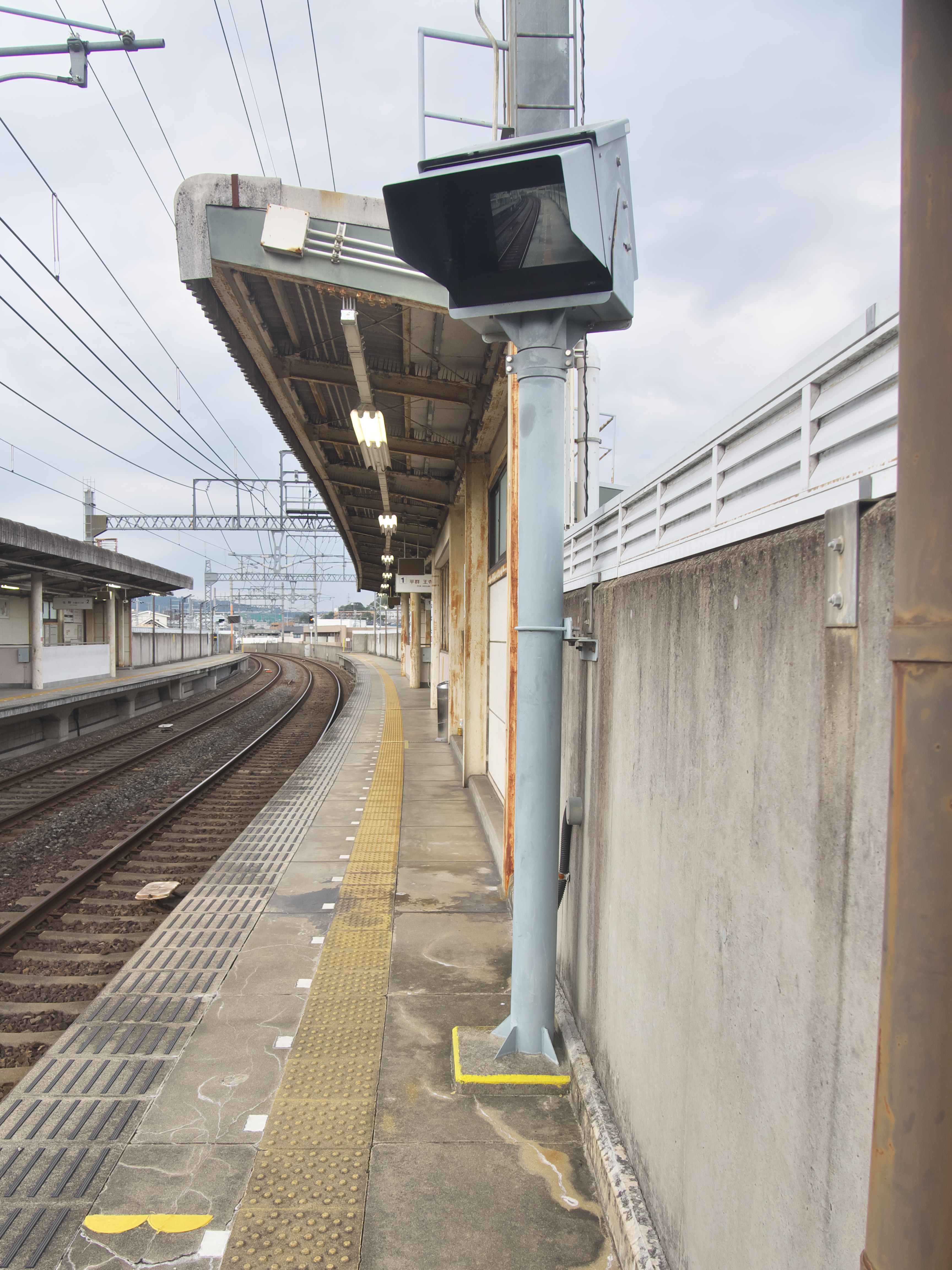 ワンマン運転用のホーム監視モニタ